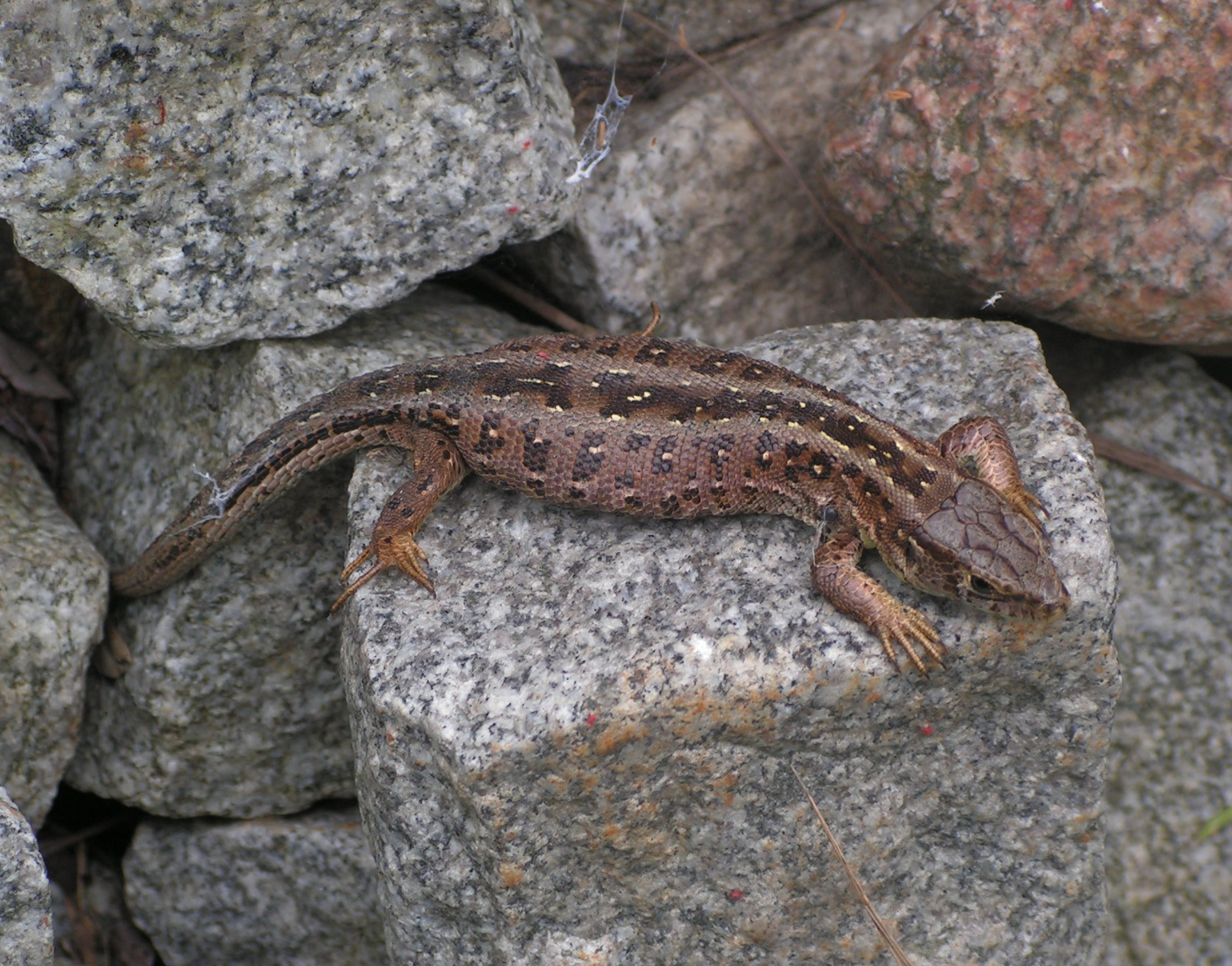 Lacerta agilis - famale